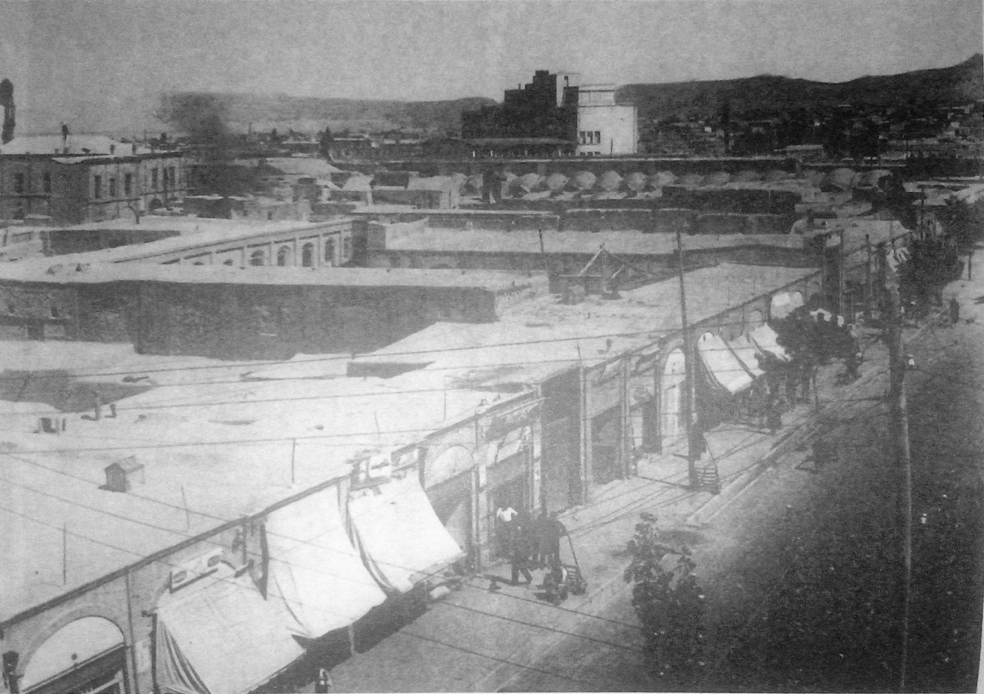 میدان دانشسرا و درب باغمیشه در تبریز.